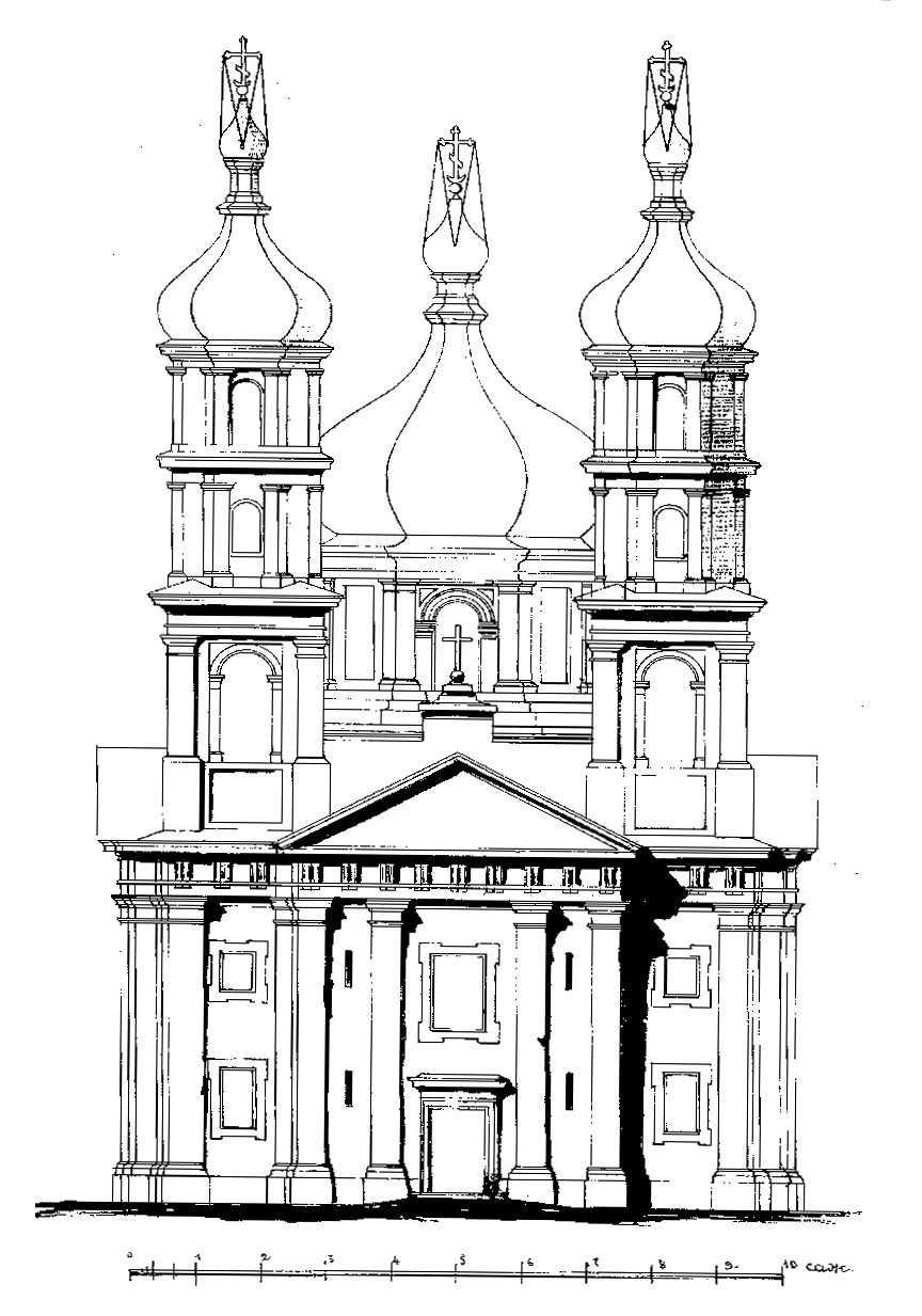 Беларуская (тарашкевіца): Ушачы (Ušačy), пляц Рынак (plac Rynak). Касьцёл і кляштар, праект маскоўскай перабудовы